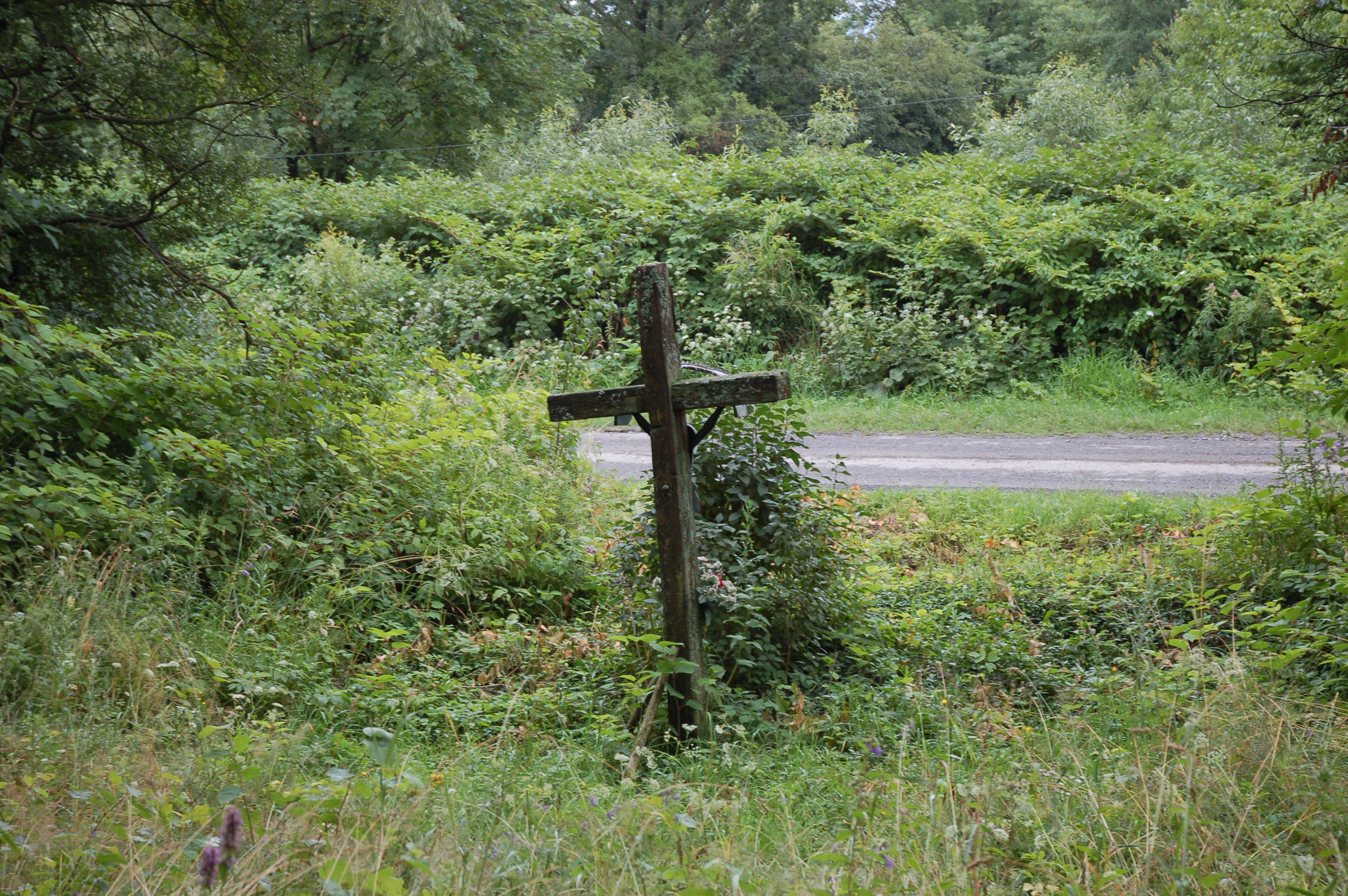 Kapliczka przydrożna w Kotowie - Krzyż